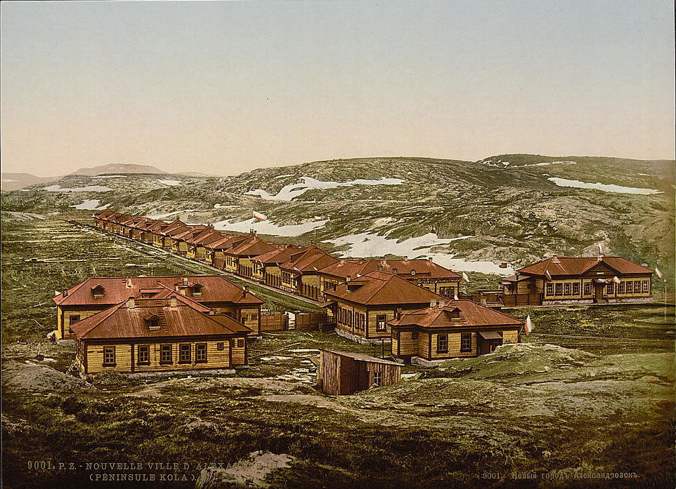 Новый город Александровск